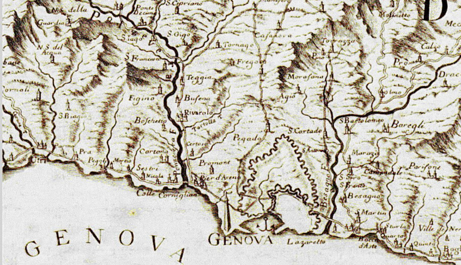 Estratto nei dintorni di Genova della carta dei Feudi Imperiali di Carlo Borgonio